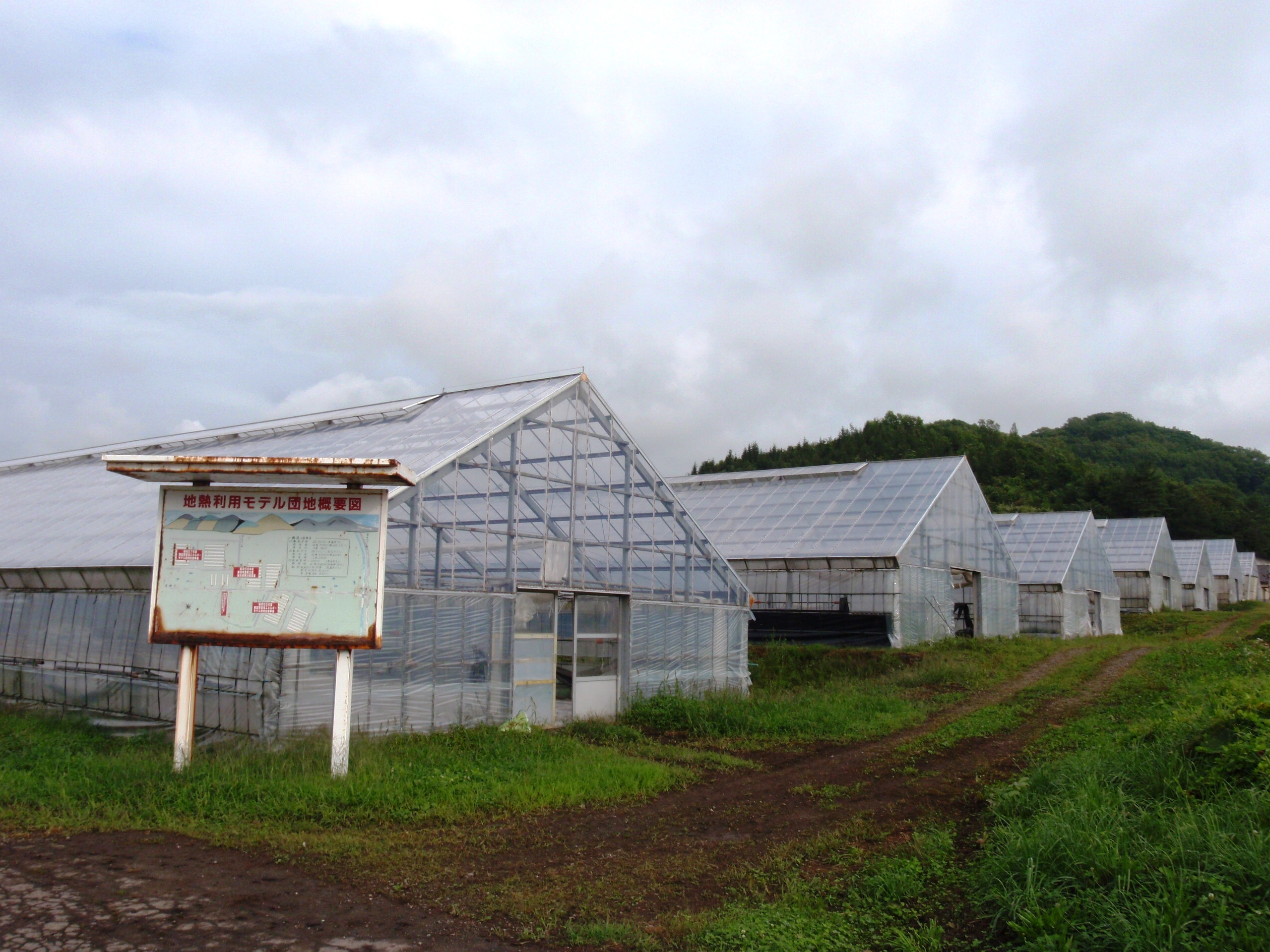 弁景温泉の温泉熱を利用したハウス団地、壮瞥町久保内地区。